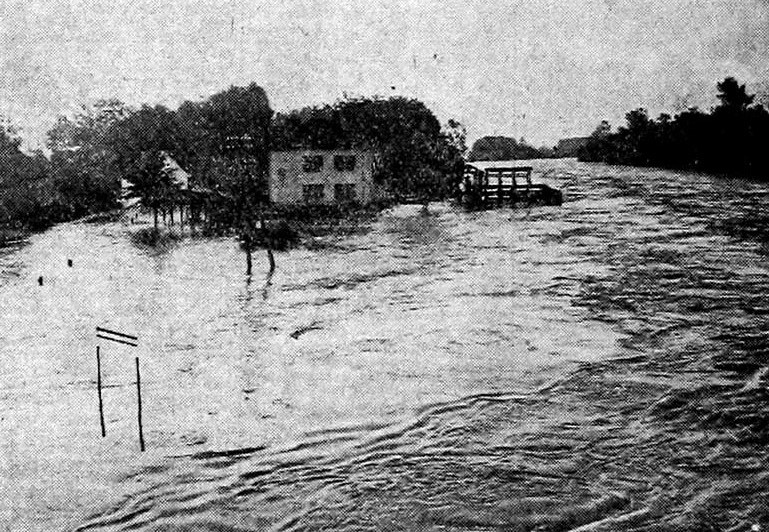 Narasla Mura v Radencih